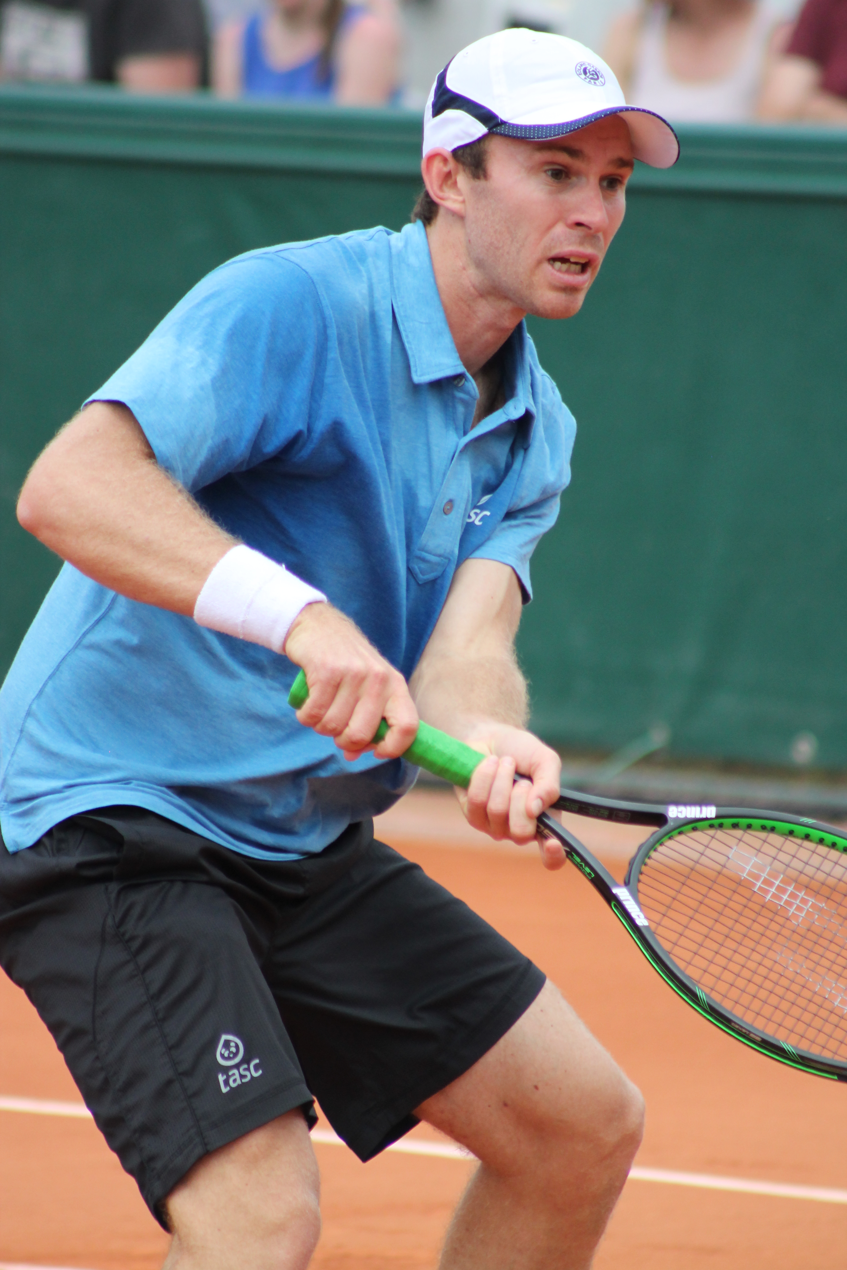 Peers RG16 (5)